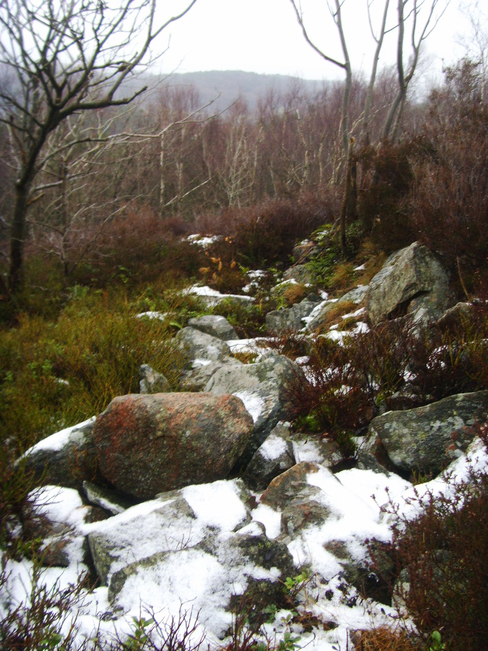 Fornborgen vid Änggårdens naturreservat i Göteborgs kommun, har RAÄ-numret Göteborg 189:1.